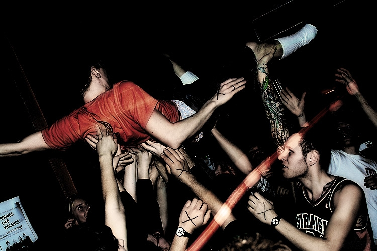 Vegan Straight Edge Band To Kill live